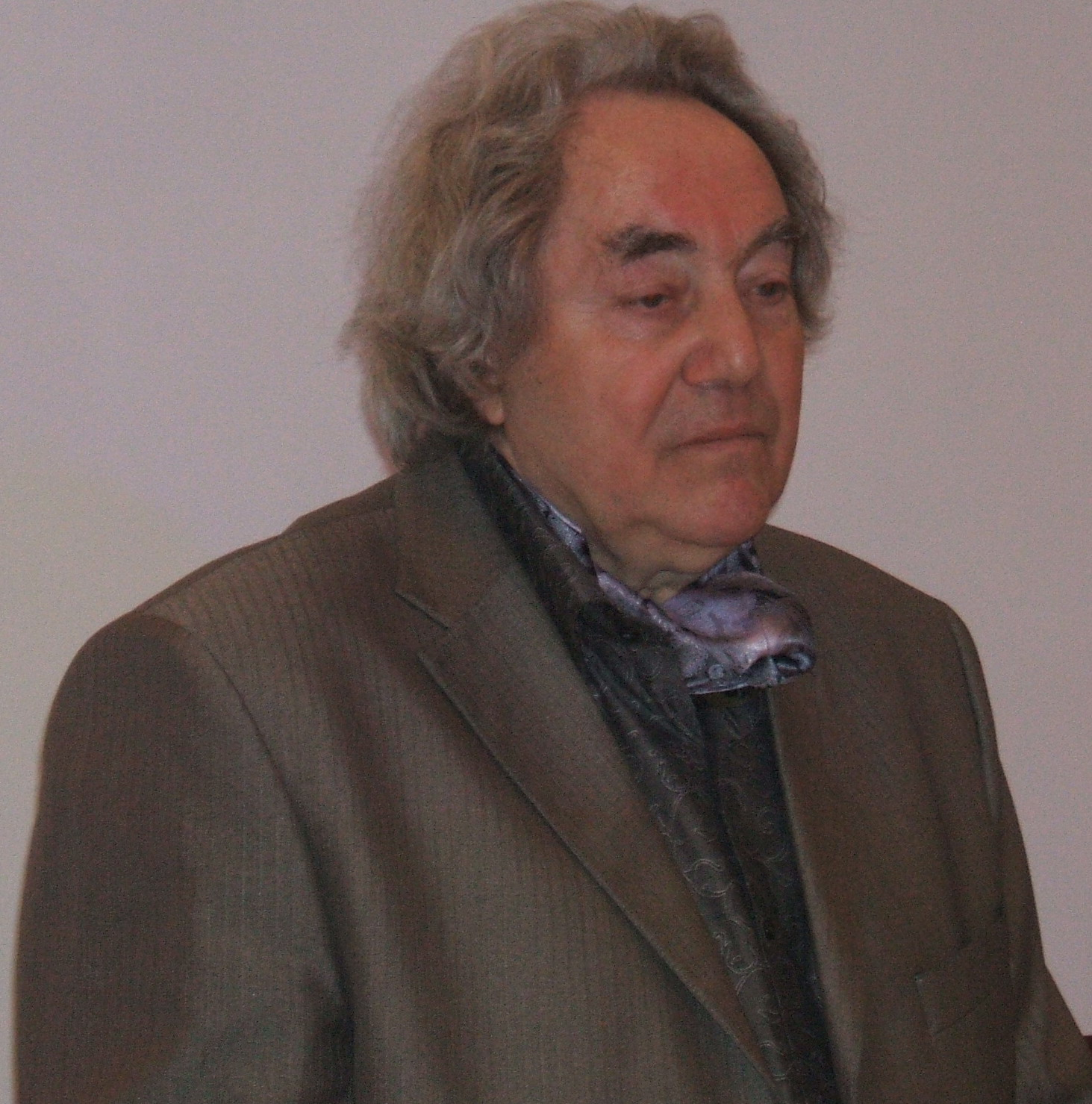 Сестрорецк СПб Фитодизайнер Кулешов Влад Петерович